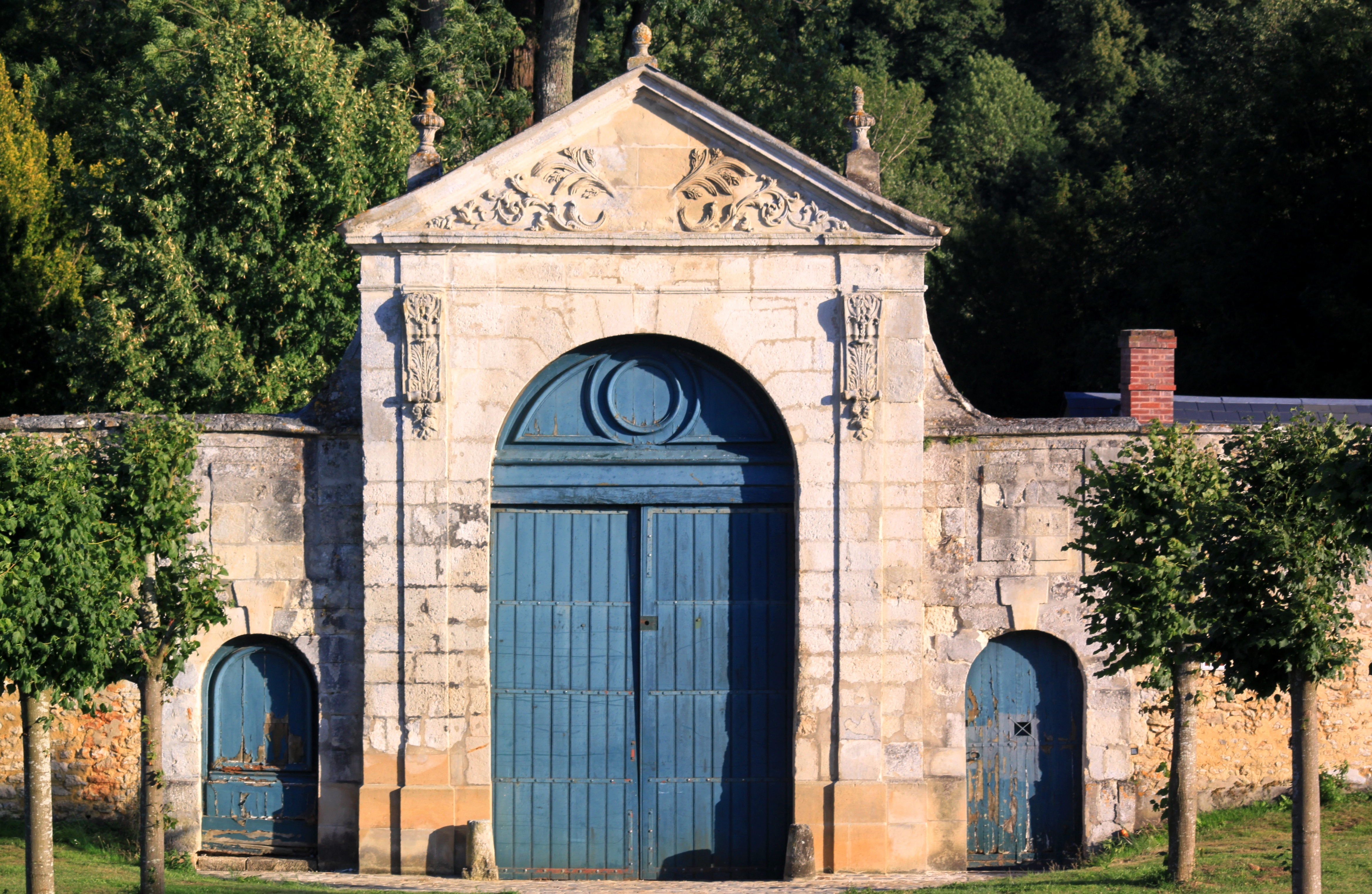 Le portail de l'Abbaye, située à Bus-Saint-Rémy